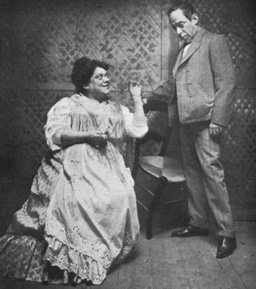 Los actores españoles Ricardo Simó-Raso y Leocadia Alba en una escena de la obra de teatro No somos nadie, de Fernández Shaw